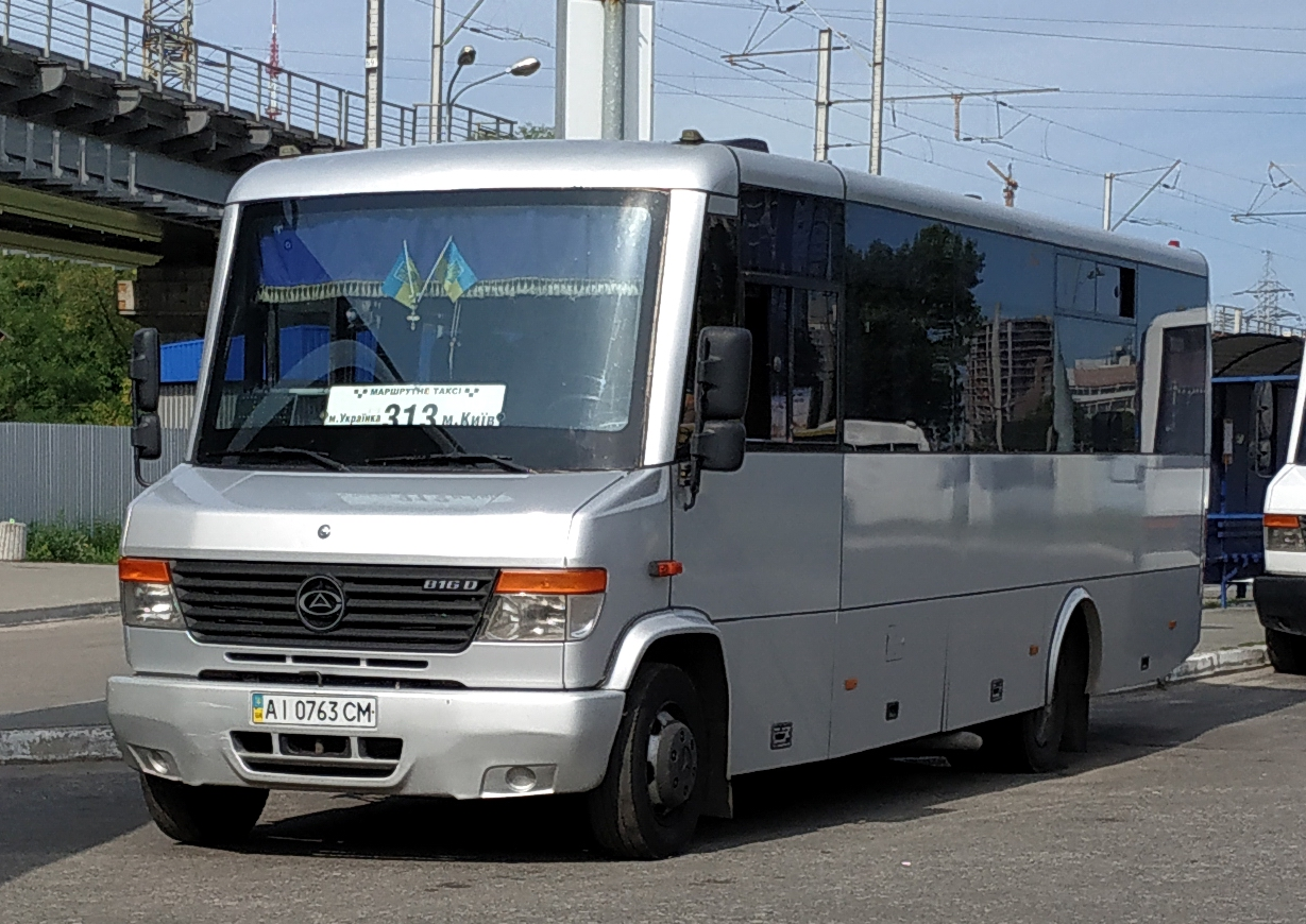 Автобус Стрый-Авто А-07563, Киев, автостанция Выдубичи, 2019 г.